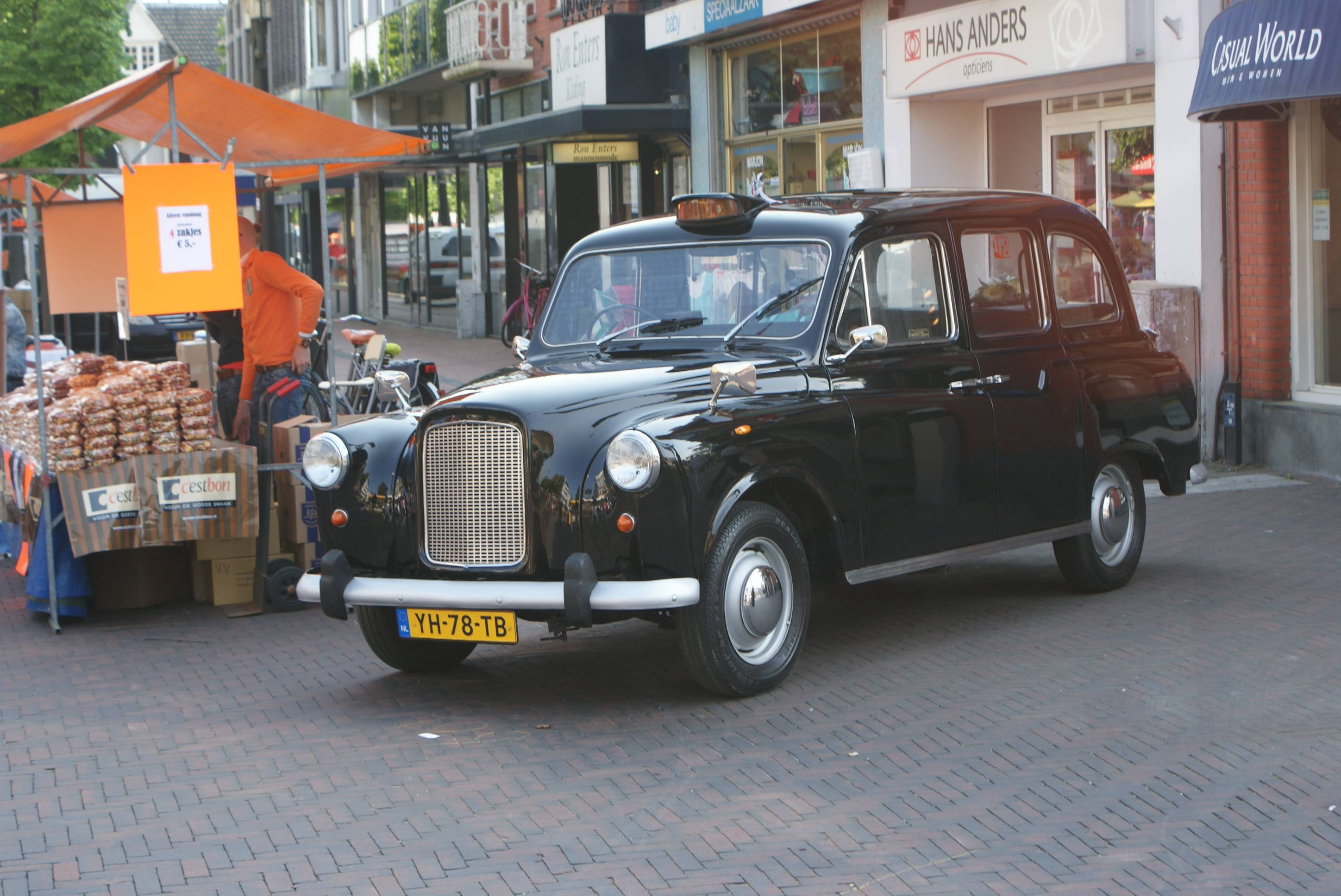 YH-78-TB